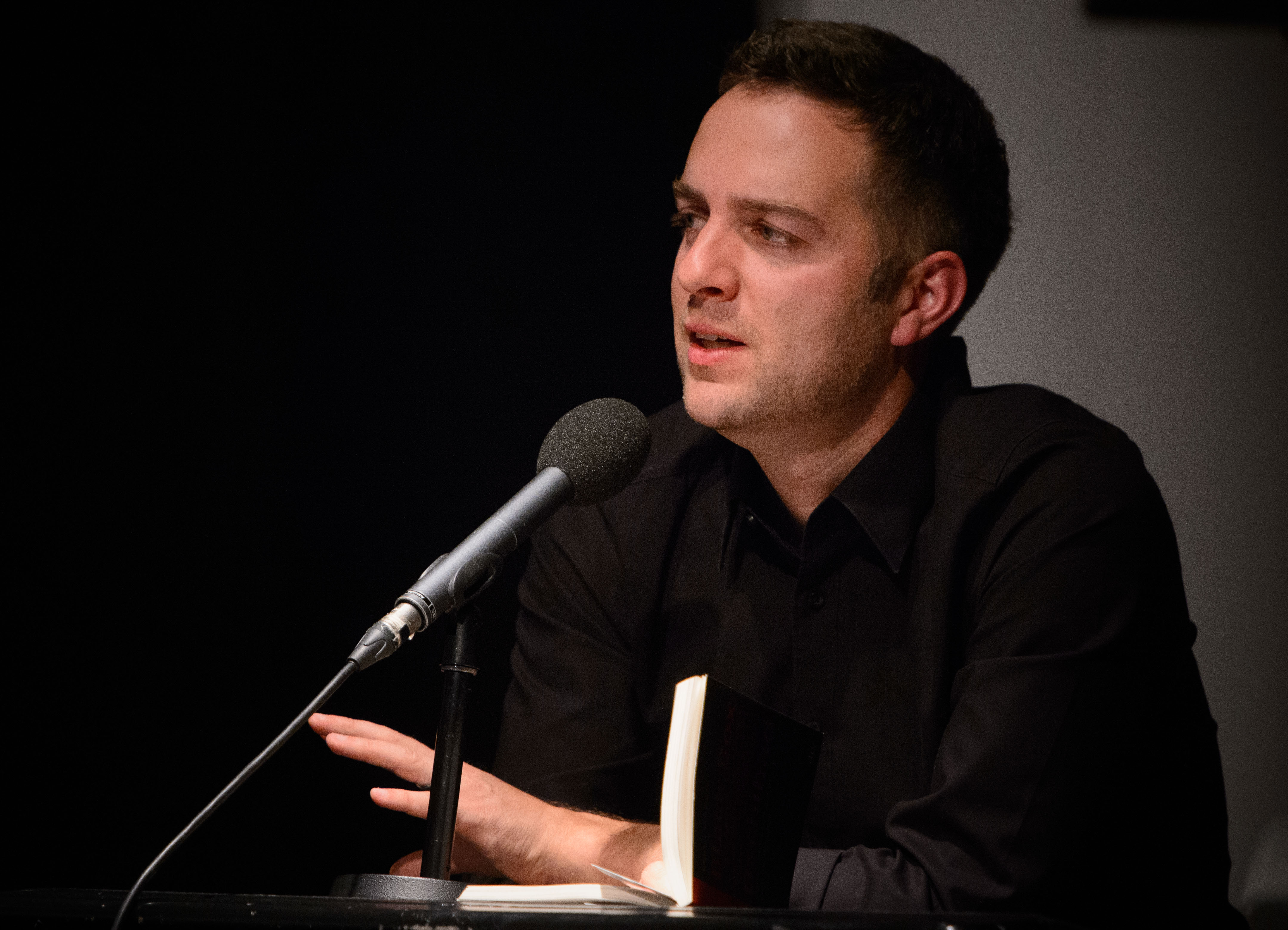 Martin Schäuble (Schriftsteller, Deutschland), Foto